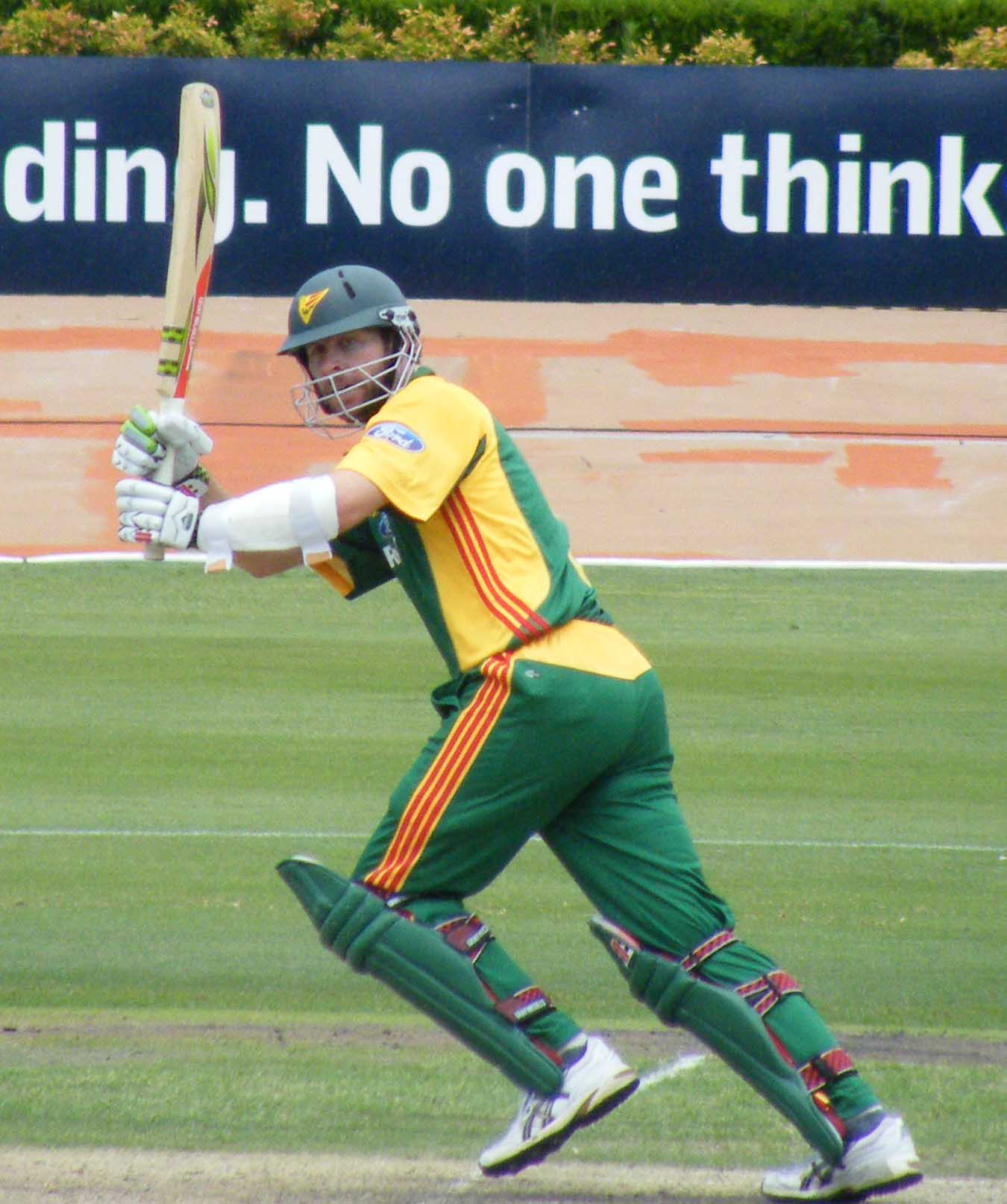 Michael Dighton